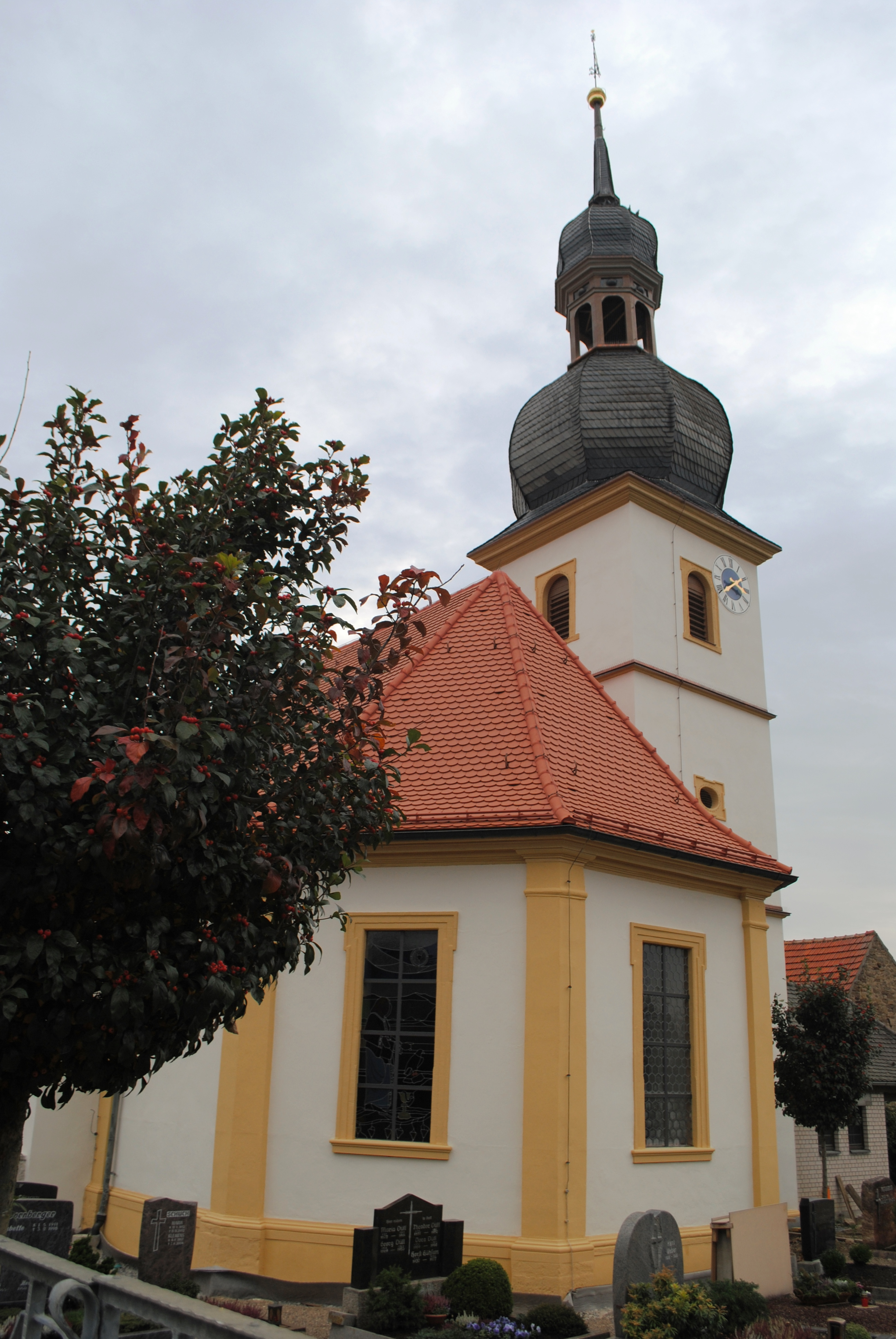 Kirche, Bimbach, Kirchplatz